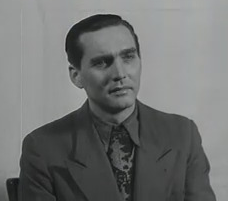 Leo Narziß Volk, genannt Leo Volk (* 2. Mai 1909 in Berlin; † 1973) war ein deutscher Jurist und SS-Hauptsturmführer. Volk wurde in den Nürnberger Prozessen angeklagt und als Kriegsverbrecher verurteilt.